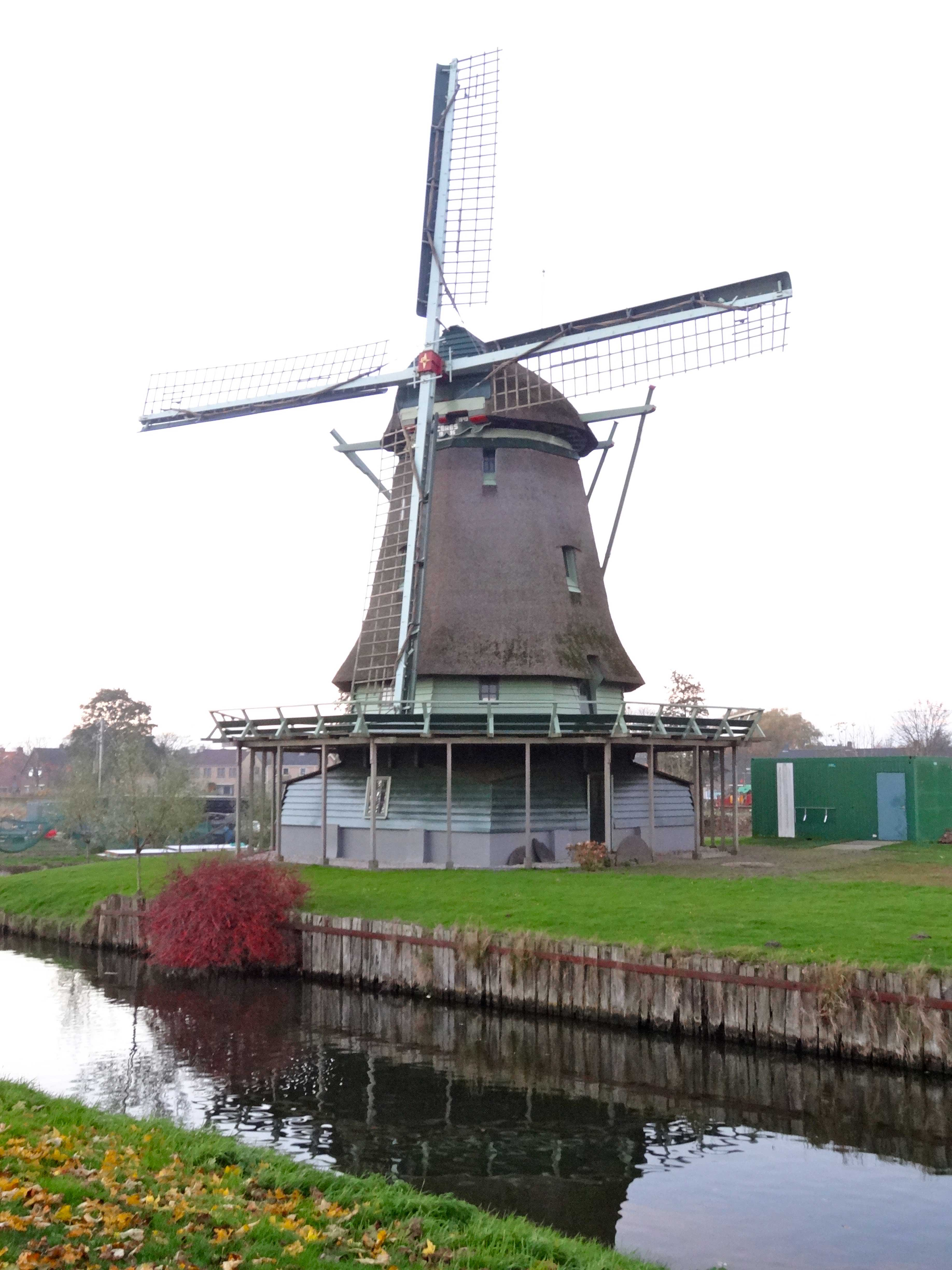 Korenmolen Ceres in Bovenkarspel